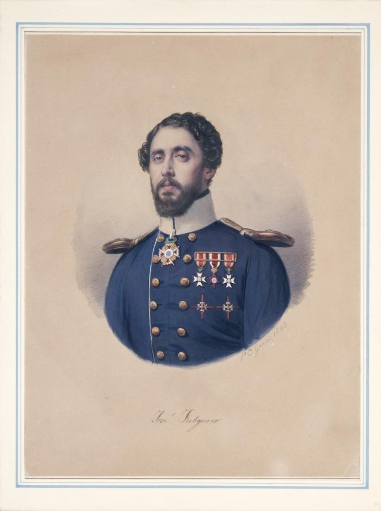 Paul Cesaire Garioz, José Fulgosio, gouache sobre papel agarbanzado, 340 x 260 mm, Madrid, Museo del Romanticismo. Procede del "Álbum original de Retratos Históricos de Doña María Cristina de Borbón", encargado a varios artistas por la reina gobernadora en su exilio en París, como reconocimiento de gratitud a sus leales.